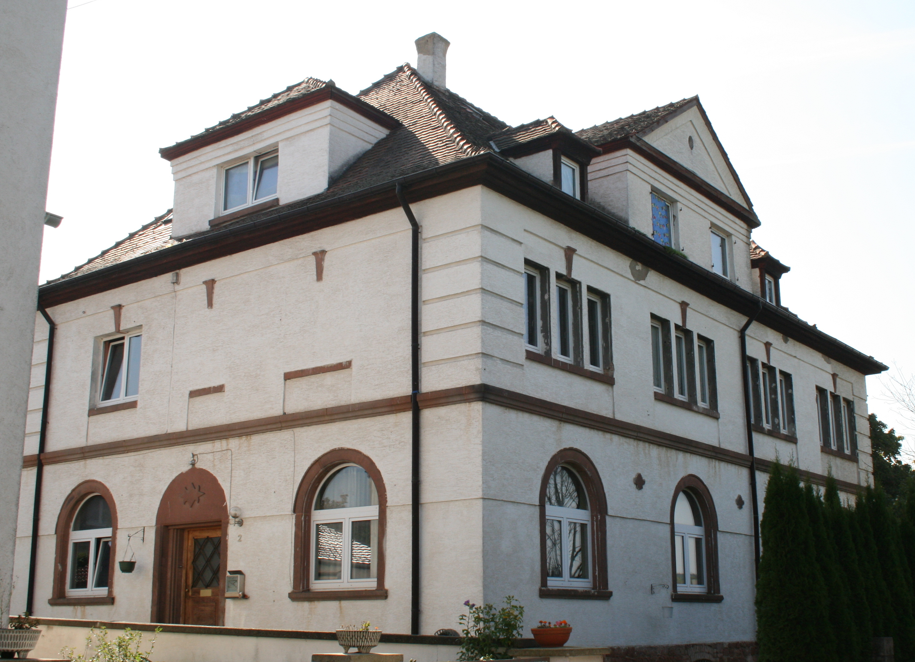 Fabrikstraße 2: Bürogebäude und Beamtenwohnhaus der Pfälzischen Tonwerke Hagenburger Schwalb Cie.; repräsentativer Walmdachbau in klassizisierendem Heimatstil, 1919